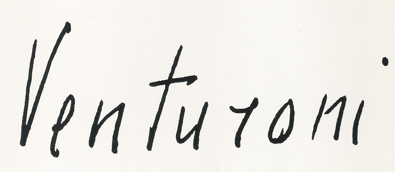 firma di Roberto Venturoni